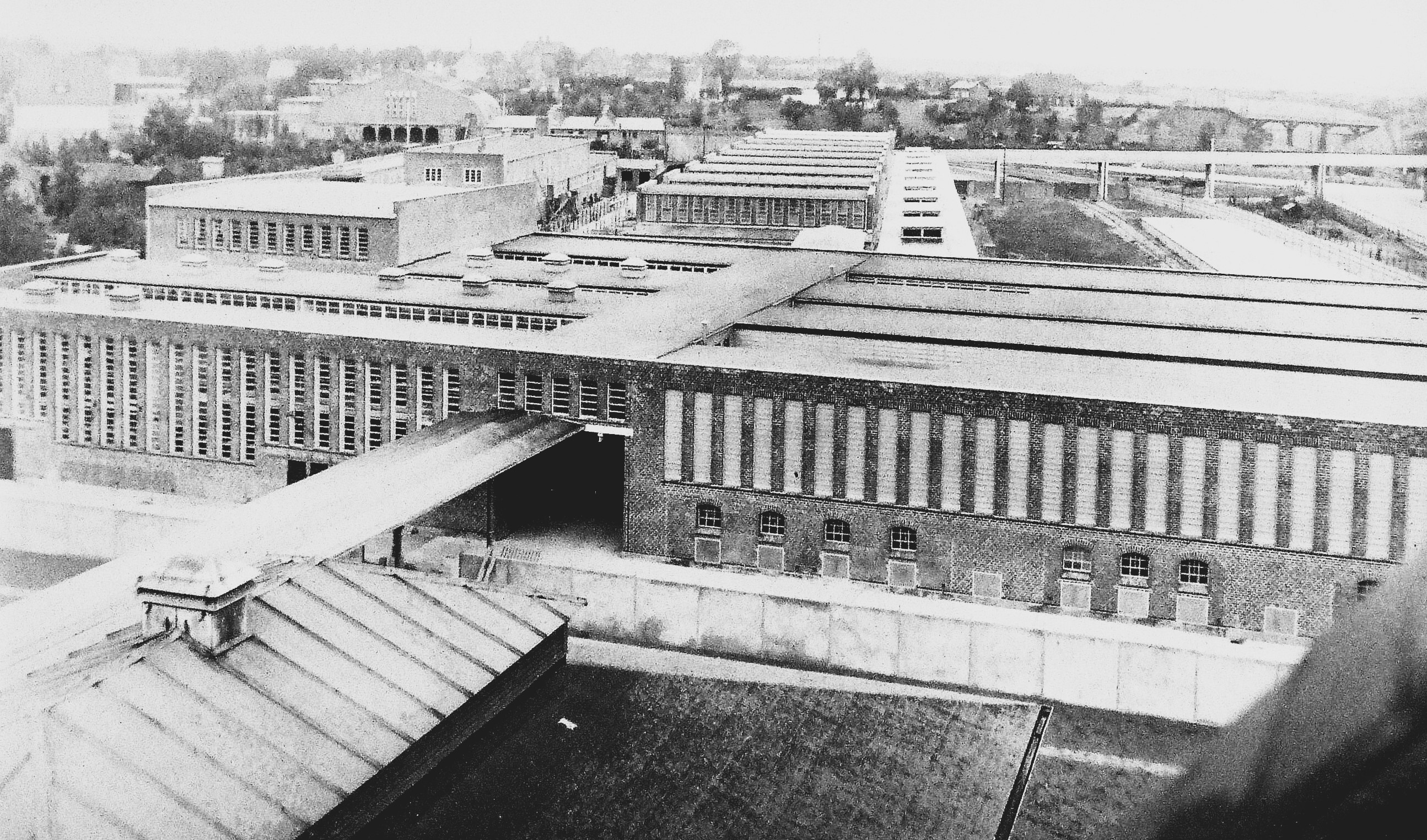 GEsamtblick auf den Seegrenzschlachthof vom alten Schlachthof aus.